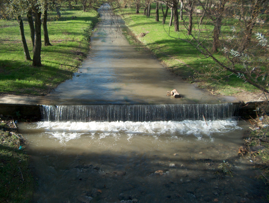 Rende, quartiere Quattromiglia: Parco fluviale di Rende (o Parco Emoli), il fiume Emoli.